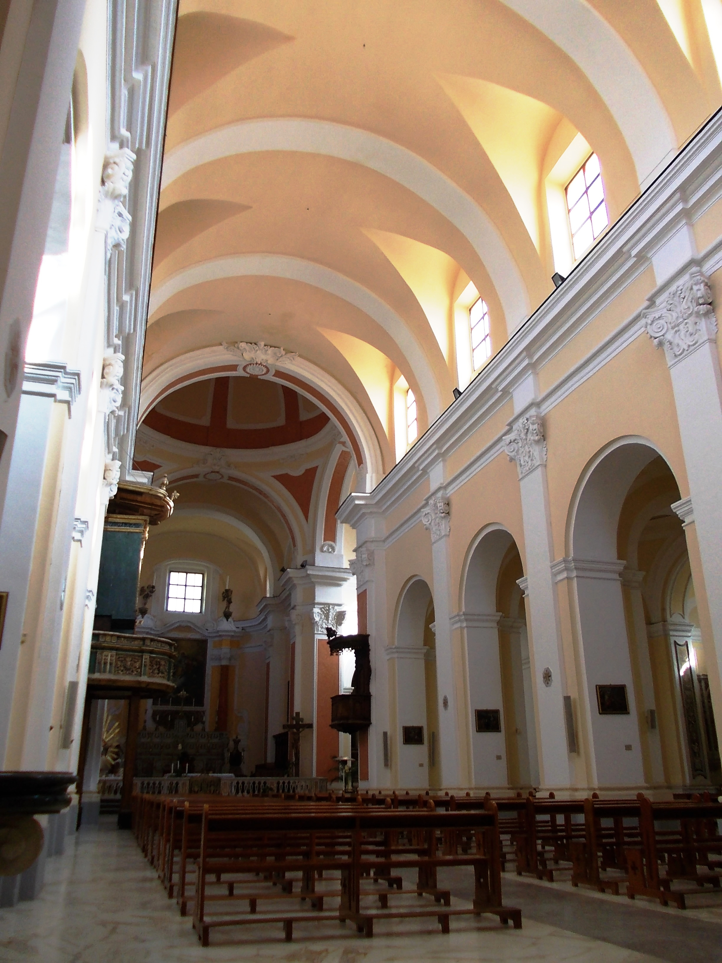 Scorcio della navata centrale della Collegiata di San Martino in Cerreto Sannita.